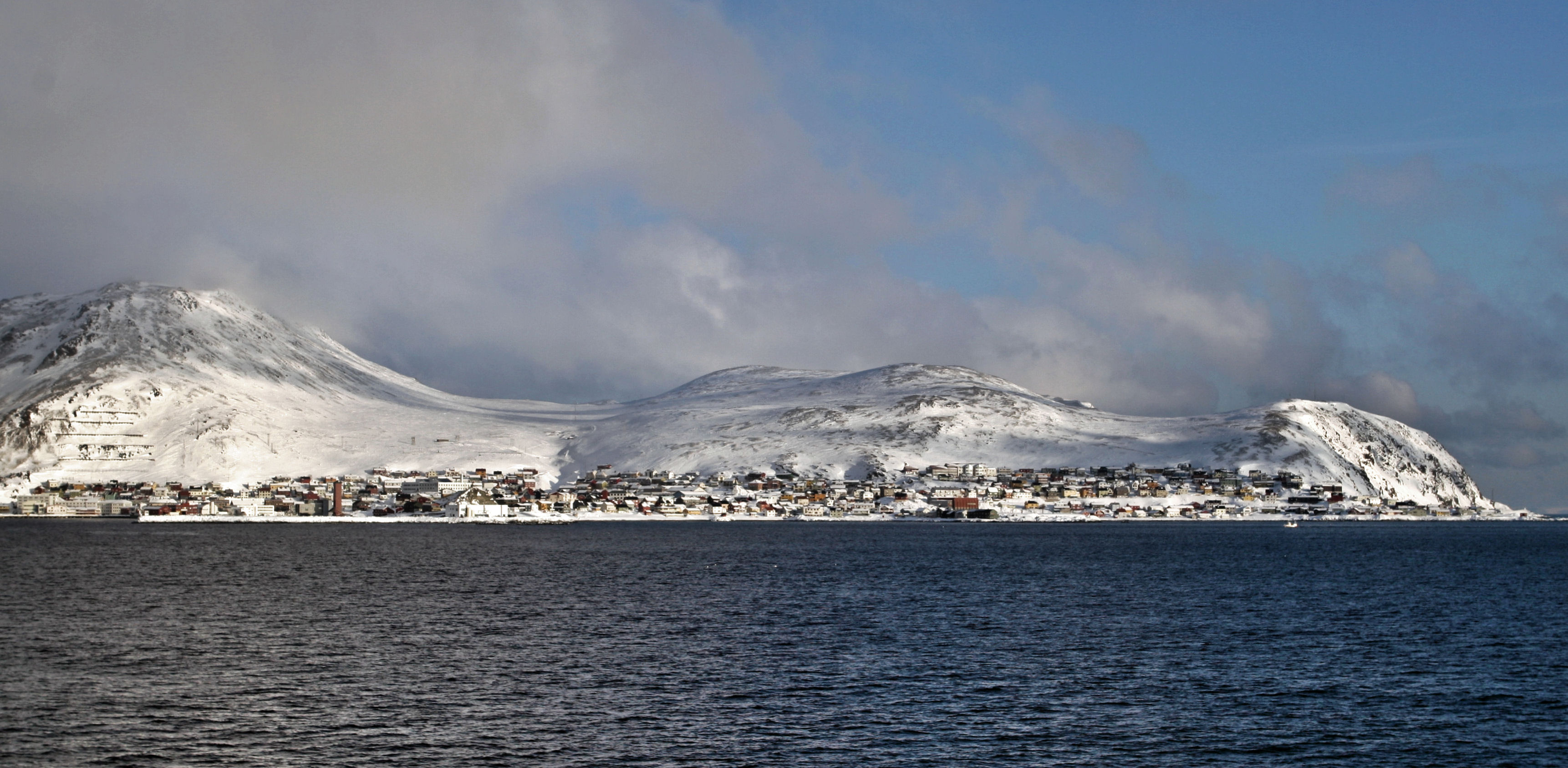 Honningsvåg